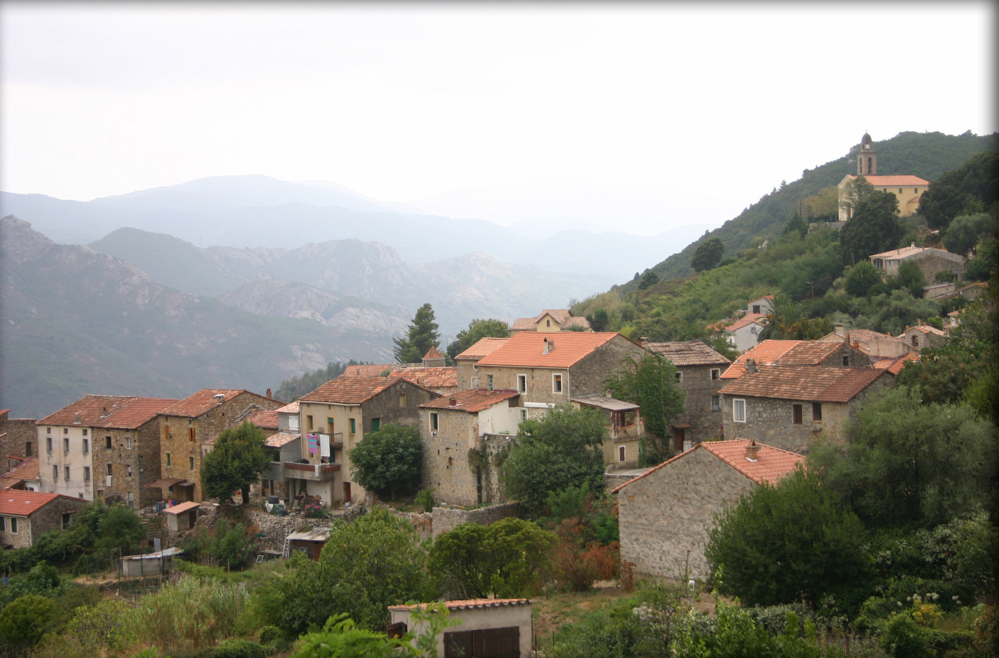 Le village natal d'Ange-Marie MINICONI en Corse du sud